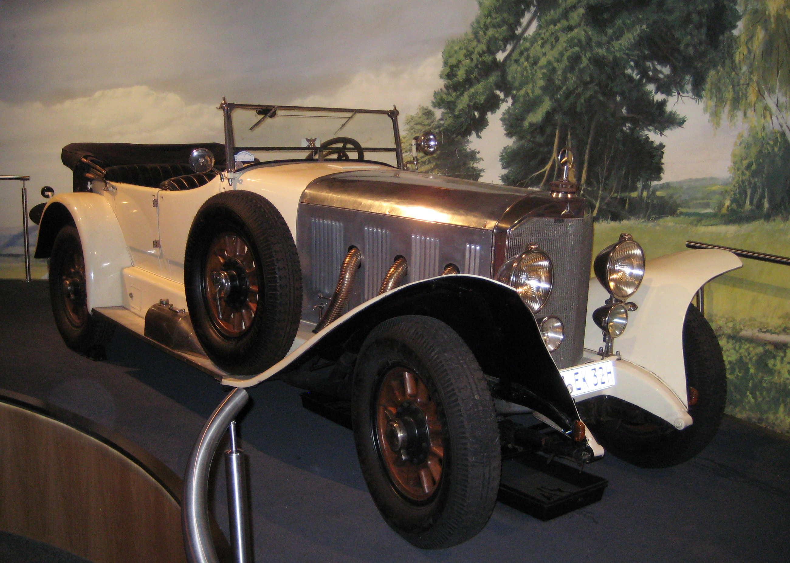 Mercedes-Benz Typ 630K im ringwerk